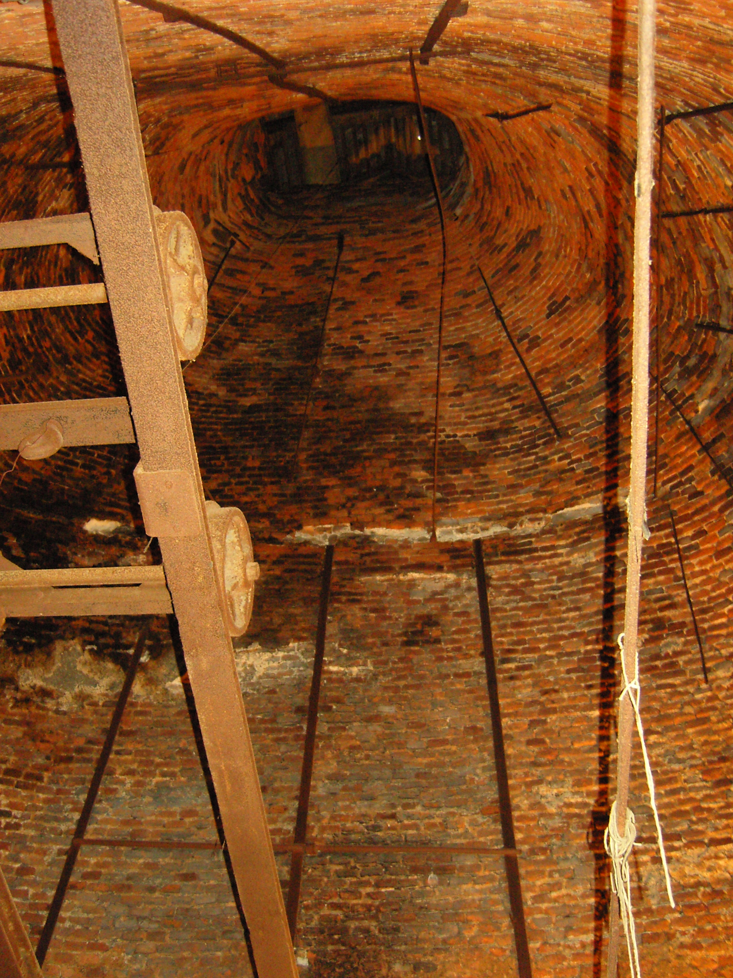 Esse im Gießereiflügel des Messinghofs in Kassel